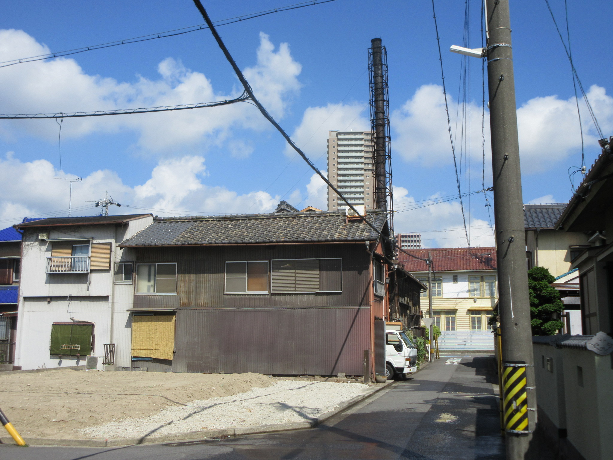 龍城温泉（岡崎市田町）